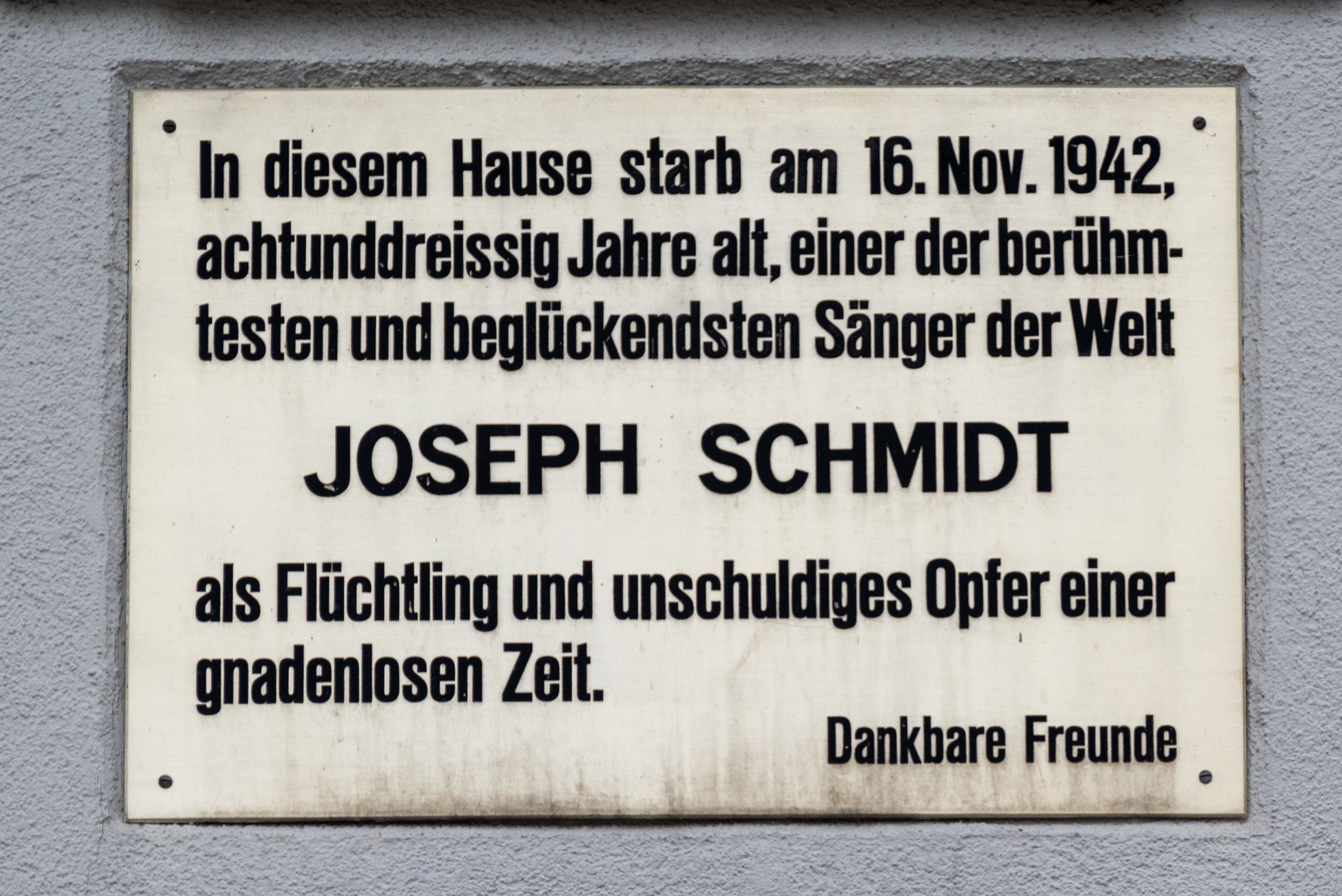 Gedenktafel für Joseph Schmidt am ehemaligen Restaurant Waldegg in Girenbad Gd. Hinwil, Schweiz